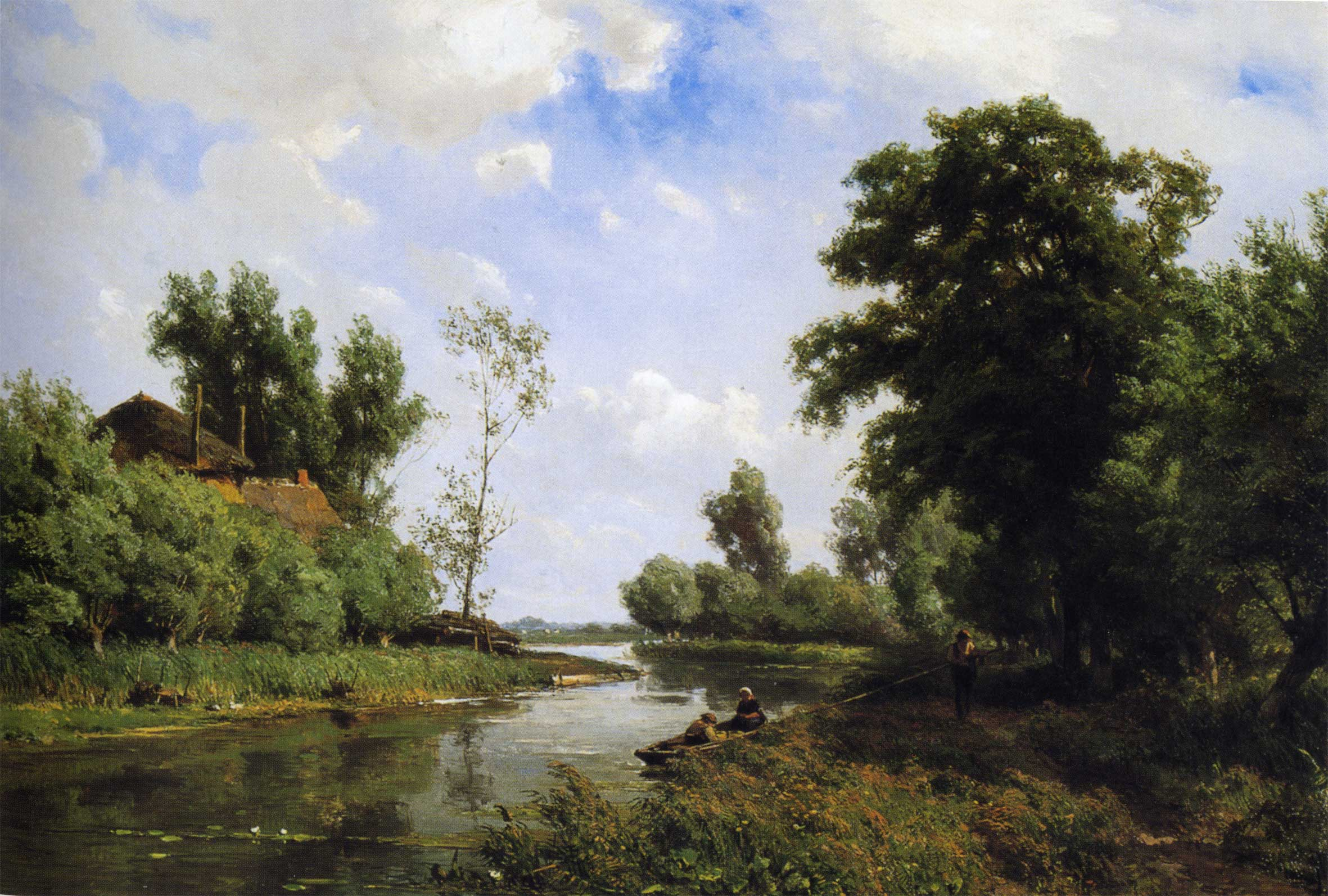 "Gezicht op riviertje de Vlist" door Jan Willem van Borselen (1825-1892)